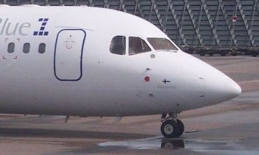 Cockpit und Bugrad einer Avro RJ85